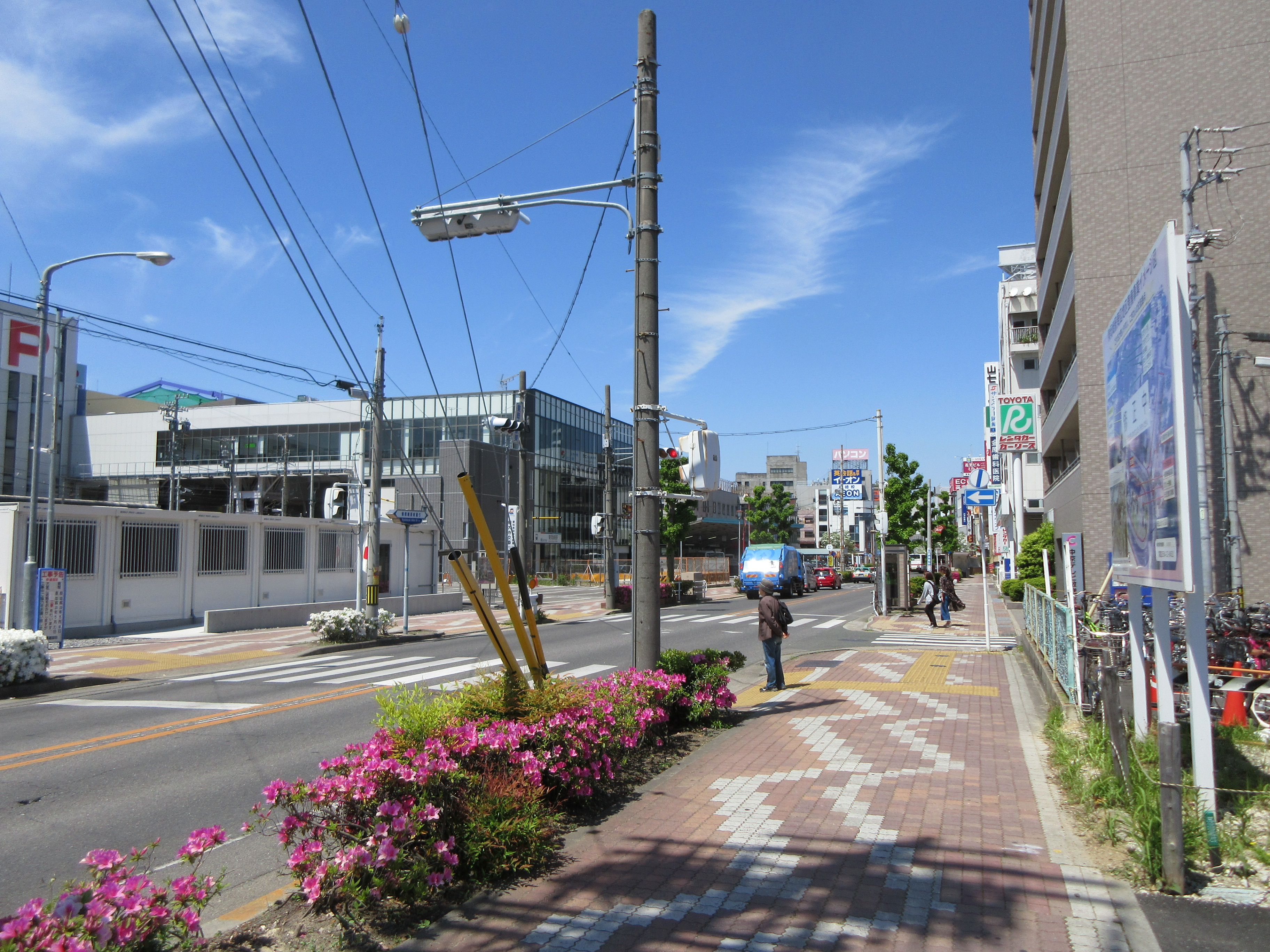 愛知県道477号東大見岡崎線。東岡崎駅前。